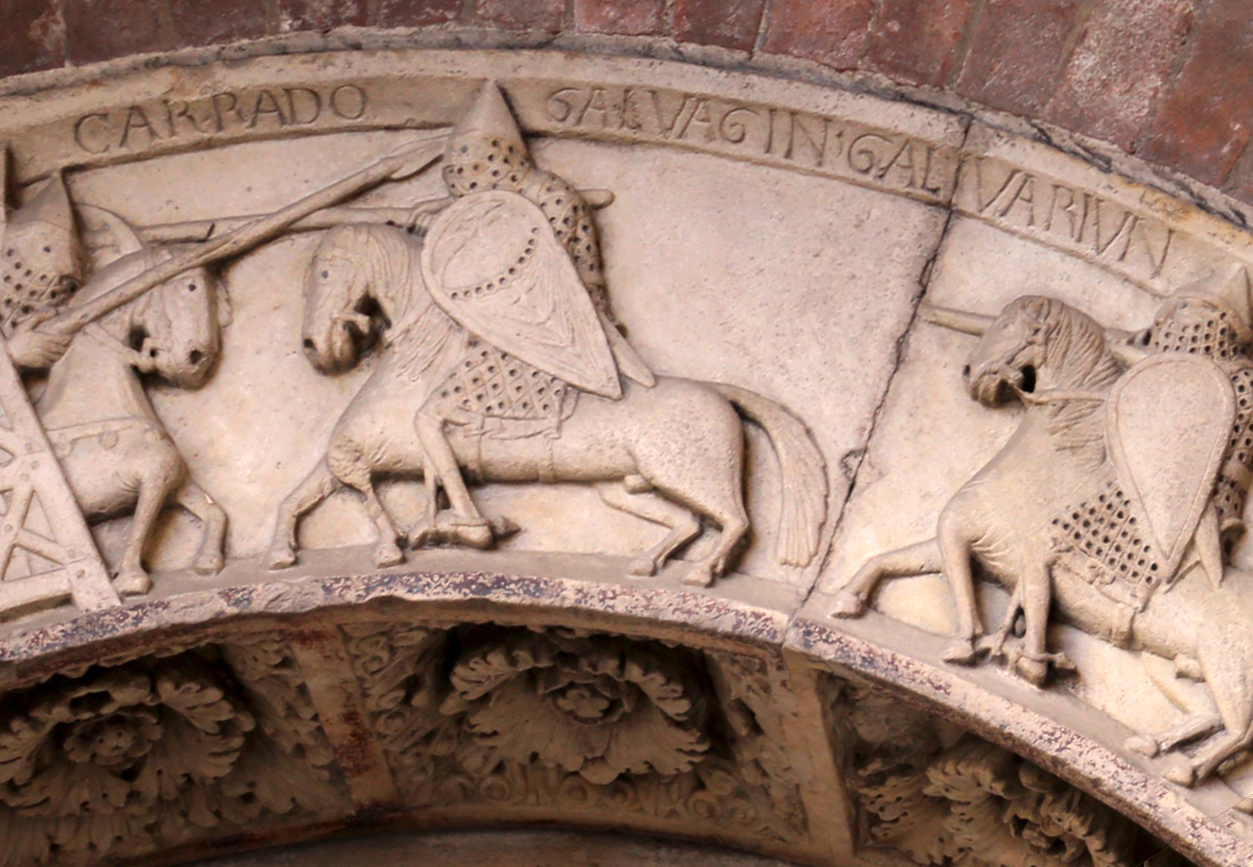 Piazza Grande (Modena) This is a photo of a monument which is part of cultural heritage of Italy.